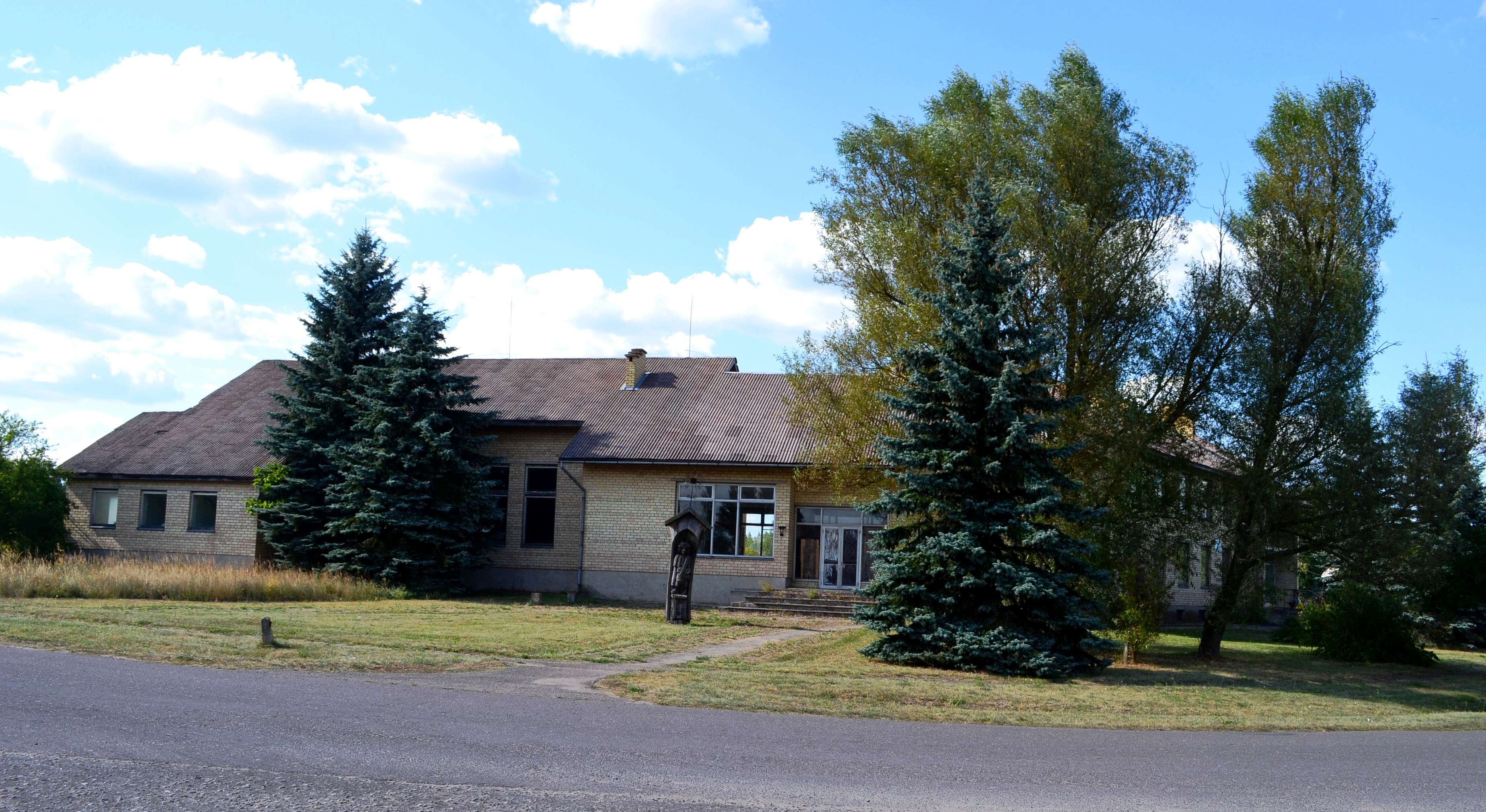 Kultūros namai, Kabeliai, Varėnos r.